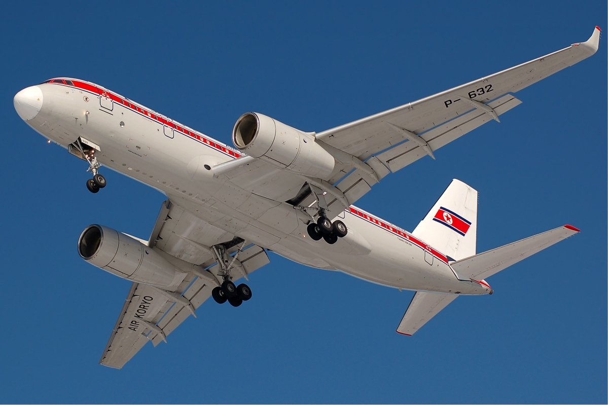 Air Koryo Tupolev Tu-204-300